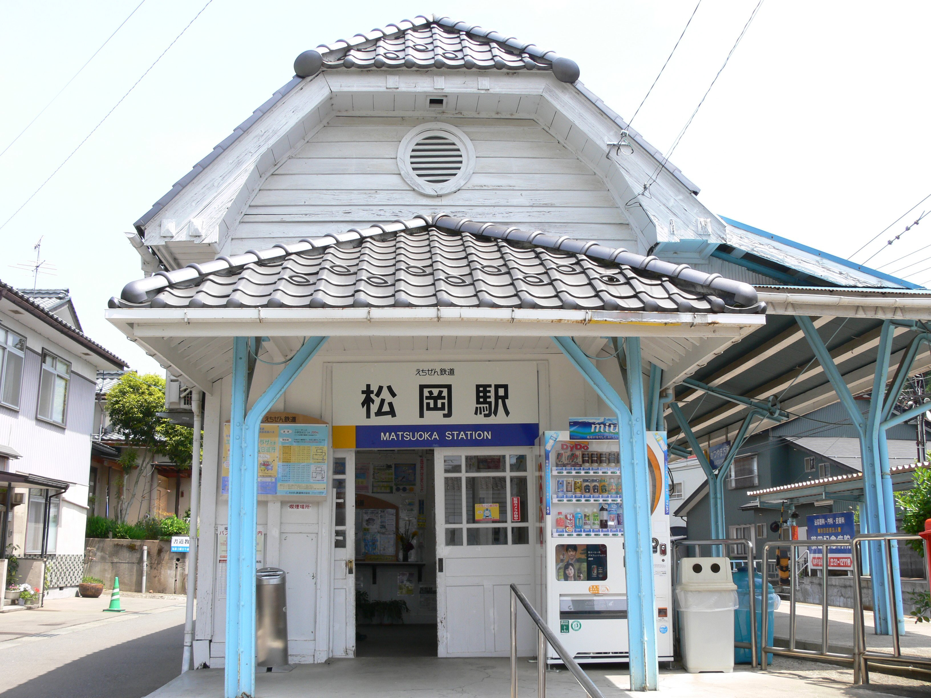 Matsuoka Station 松岡駅